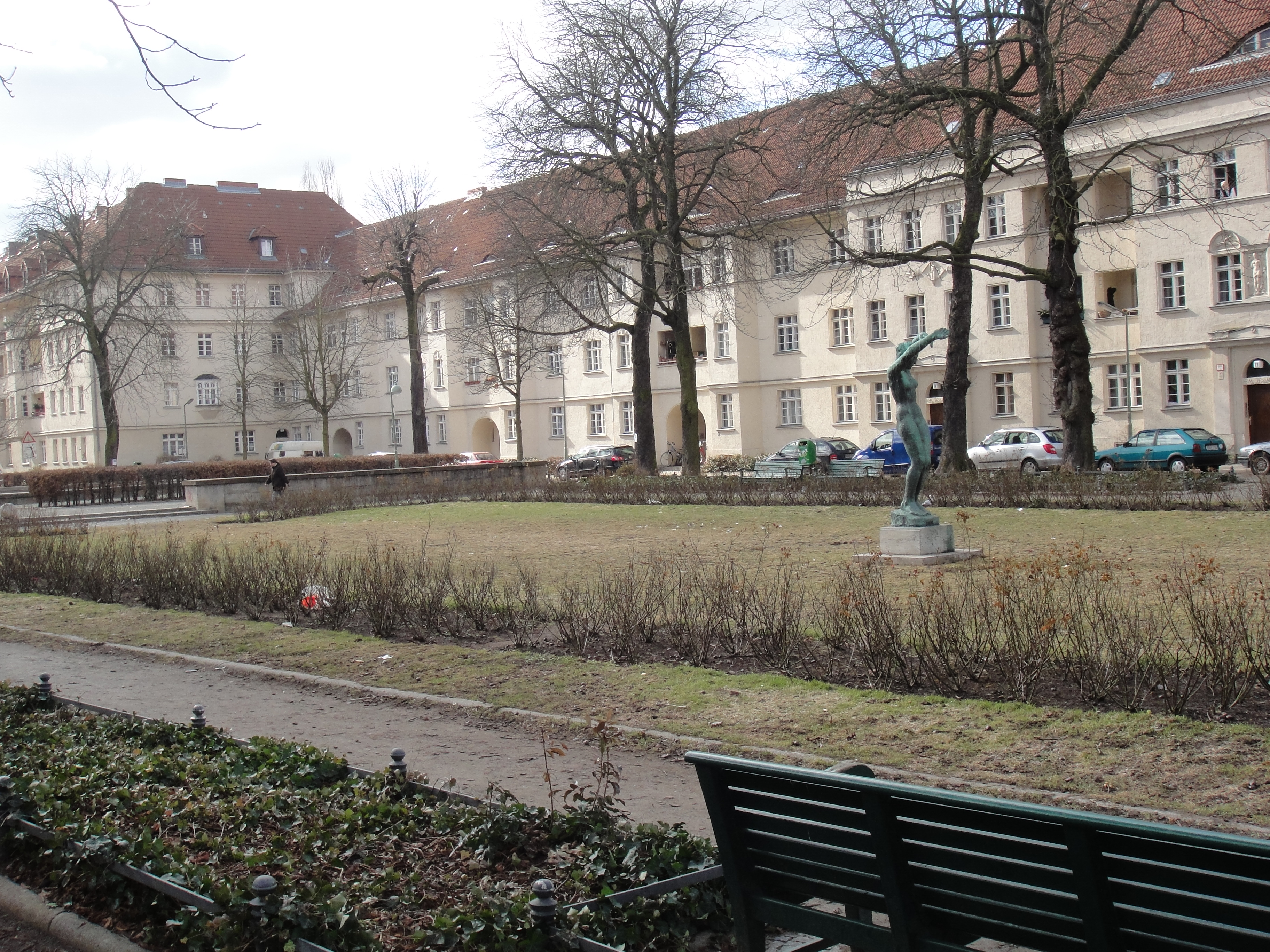 Ceciliengärten 13-18 in Berlin-Schöneberg